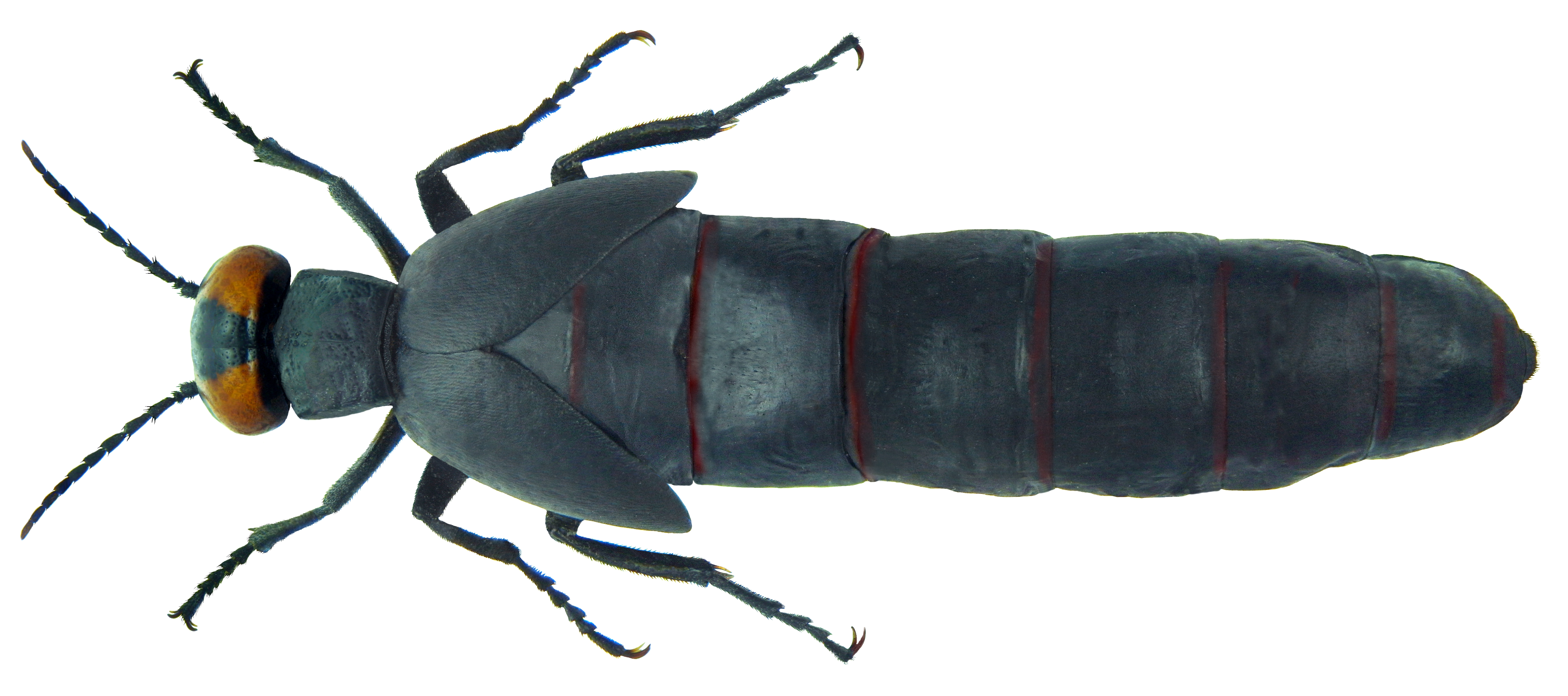 Berberomeloe insignis (Charpentier, 1818) Familie: Meloidae Groesse: 35 mm Verbreitung: endemisch im Südwesten von Spanien Fundort: Spanien, Sierra Nevada, Albunol leg. J.Scheuern, 27.IV.1987; det. Lückmann Photo: U.Schmidt, 2011